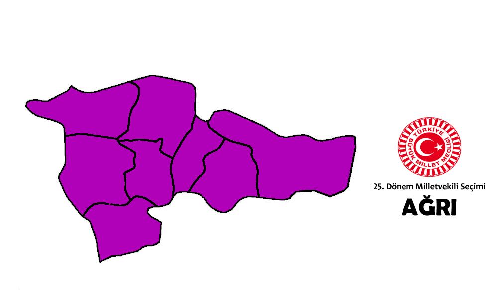 2015 genel seçim sonuçları